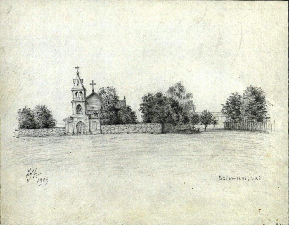 Беларуская (тарашкевіца): Дзевянішкі (Dzievianiški), пляц Рынак (plac Rynak). Касьцёл